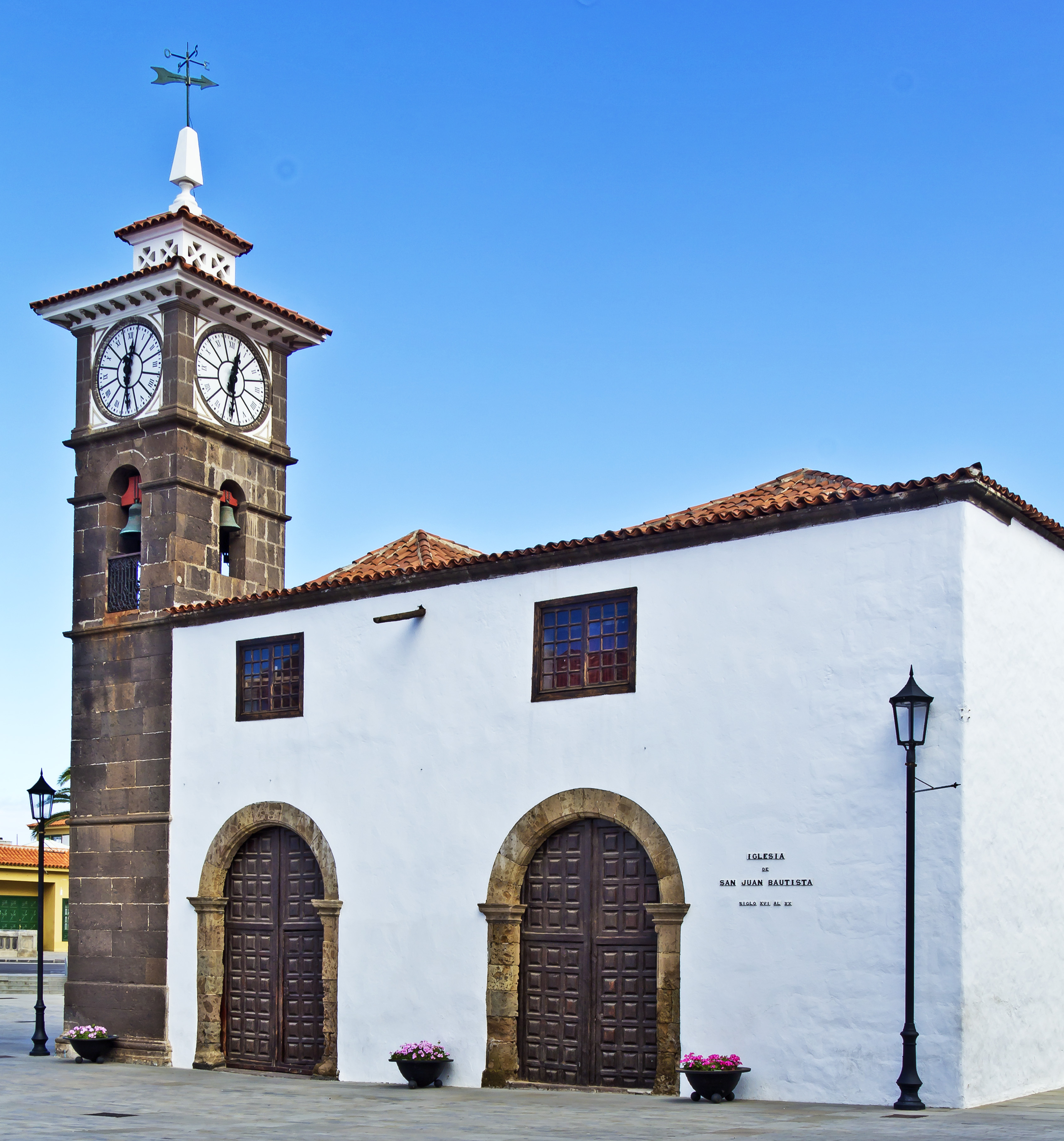 Kirche San Juan Bautista in San Juan de la Rambla (Teneriffa)